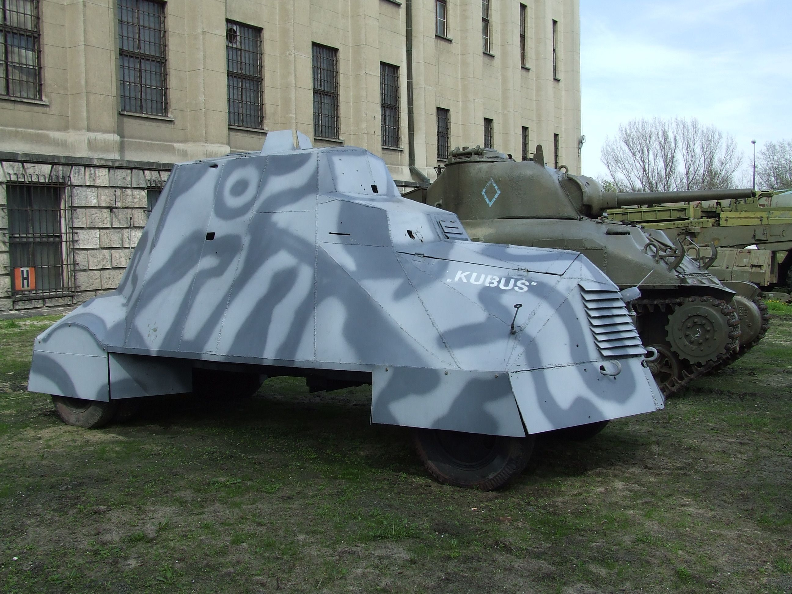 Kubuś (samochód pancerny), Muzeum Wojska Polskiego w Warszawie (Grizzly in the background)